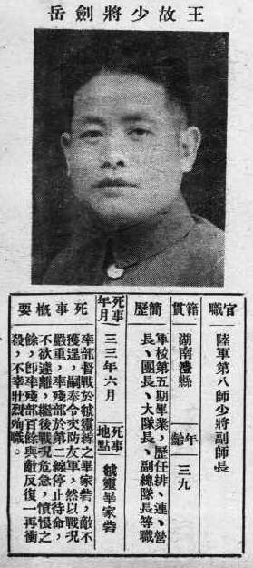 中文（台灣）: 抗戰軍人忠烈錄第一輯中的烈士遺像